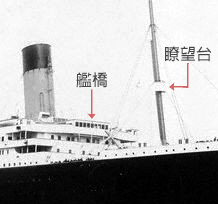 放大英國皇家郵輪鐵達尼號的艦橋和眺望台。